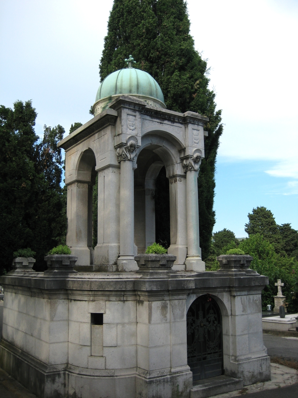 Grobnica obitelji Mikuličić na groblju Trsat